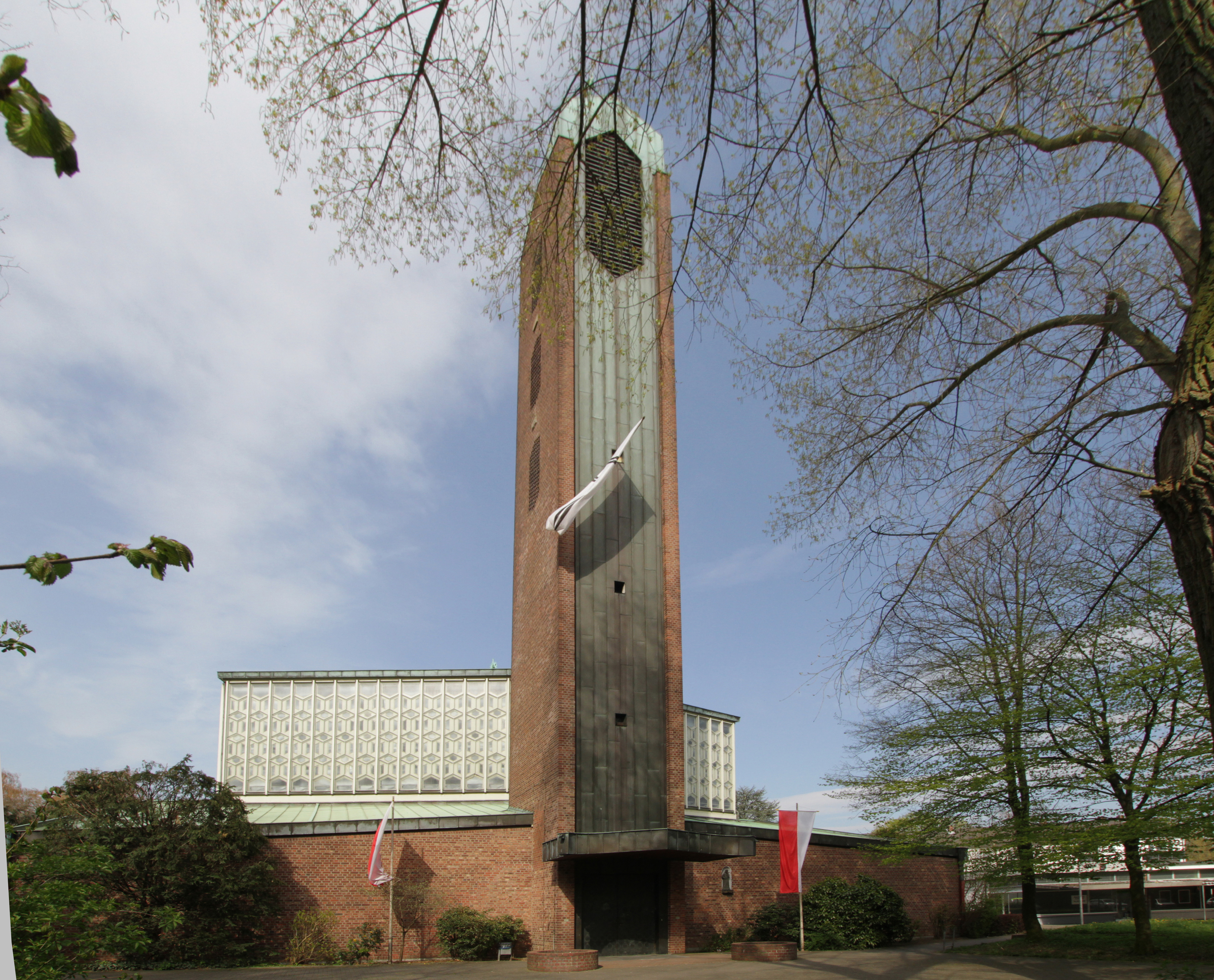 Köln-Mülheim, Sankt Bruder Klaus in der Bruder Klaus Siedlung